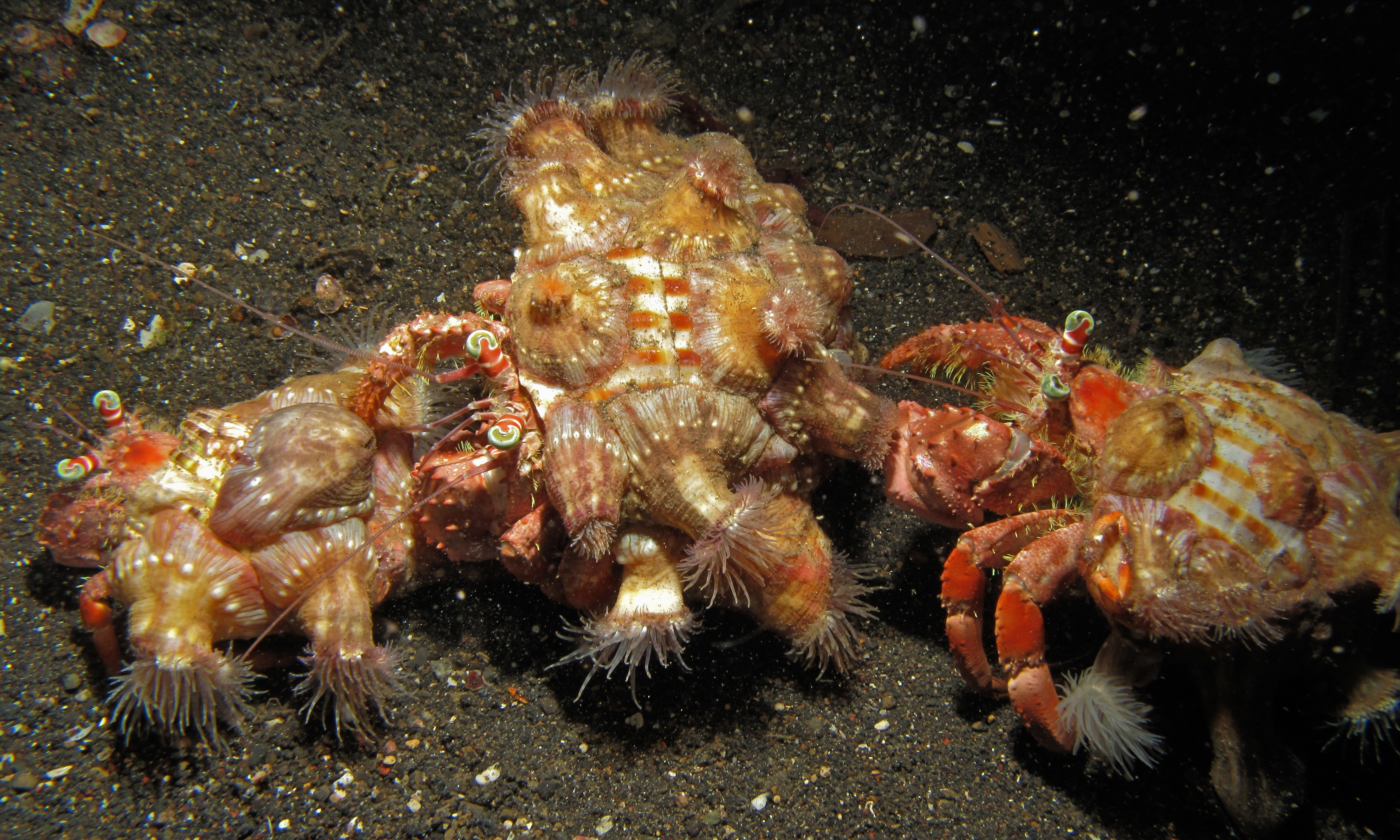 Makawide, Lembeh Strait, Sulawesi, INDONESIA